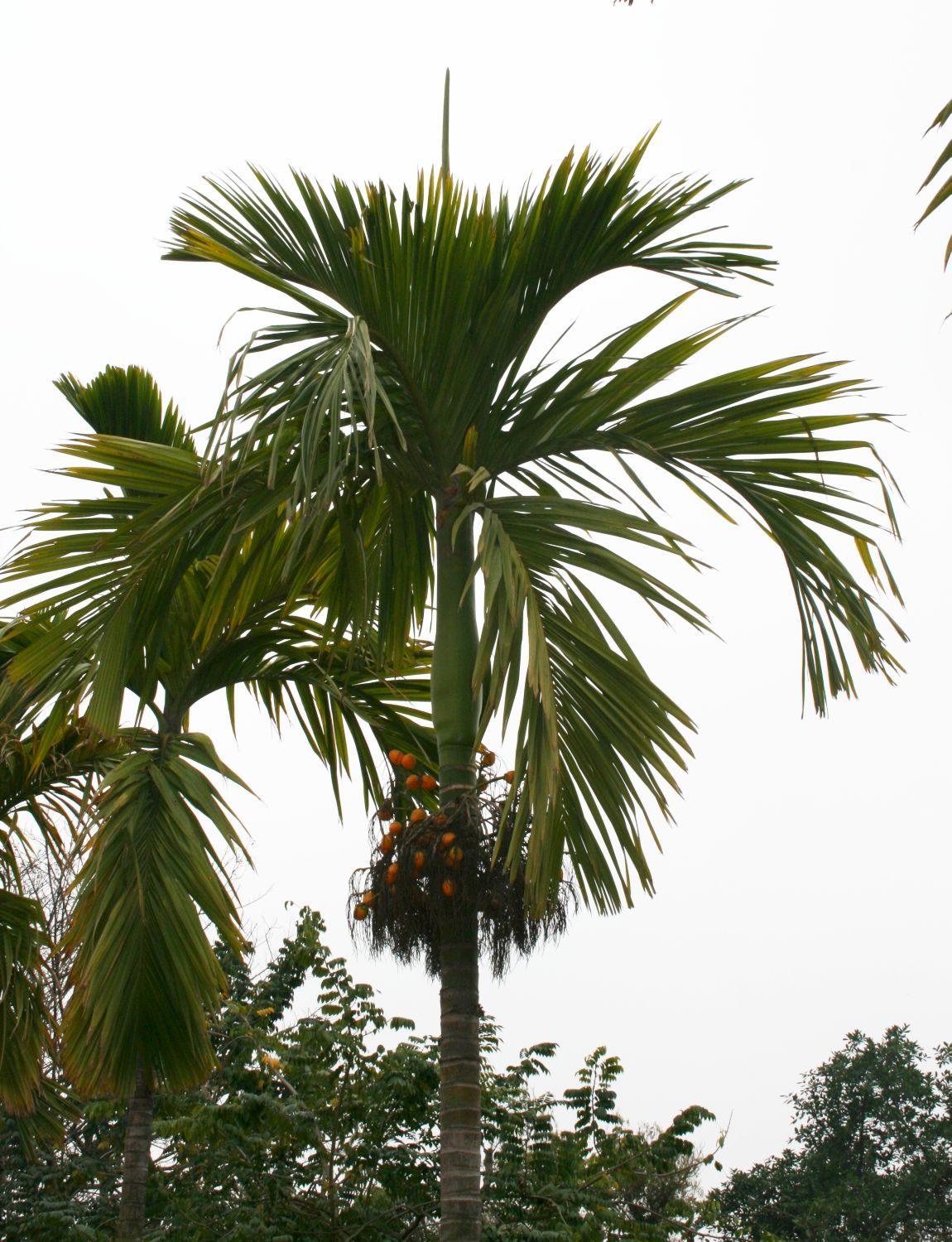 Areca catechu, Palmen (Arecaceae) - Vietnam/Việt Nam: Hanoi/Hà Nội, Ein-Säulen-Pagode/Chùa Một Cột